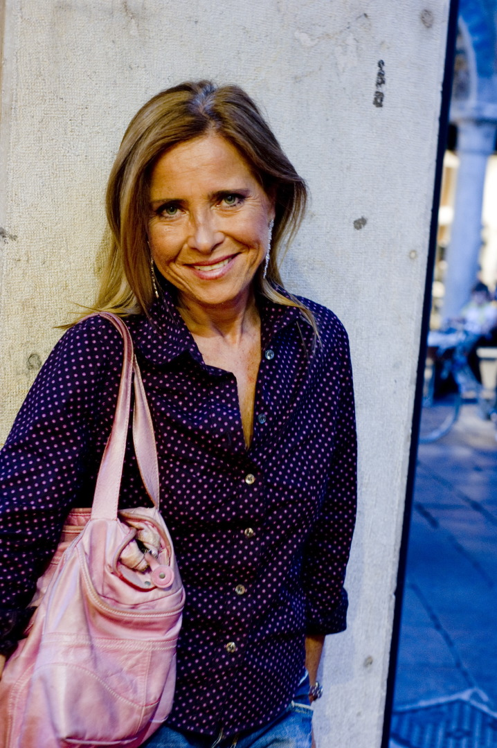 Rosa Matteucci Italian writer